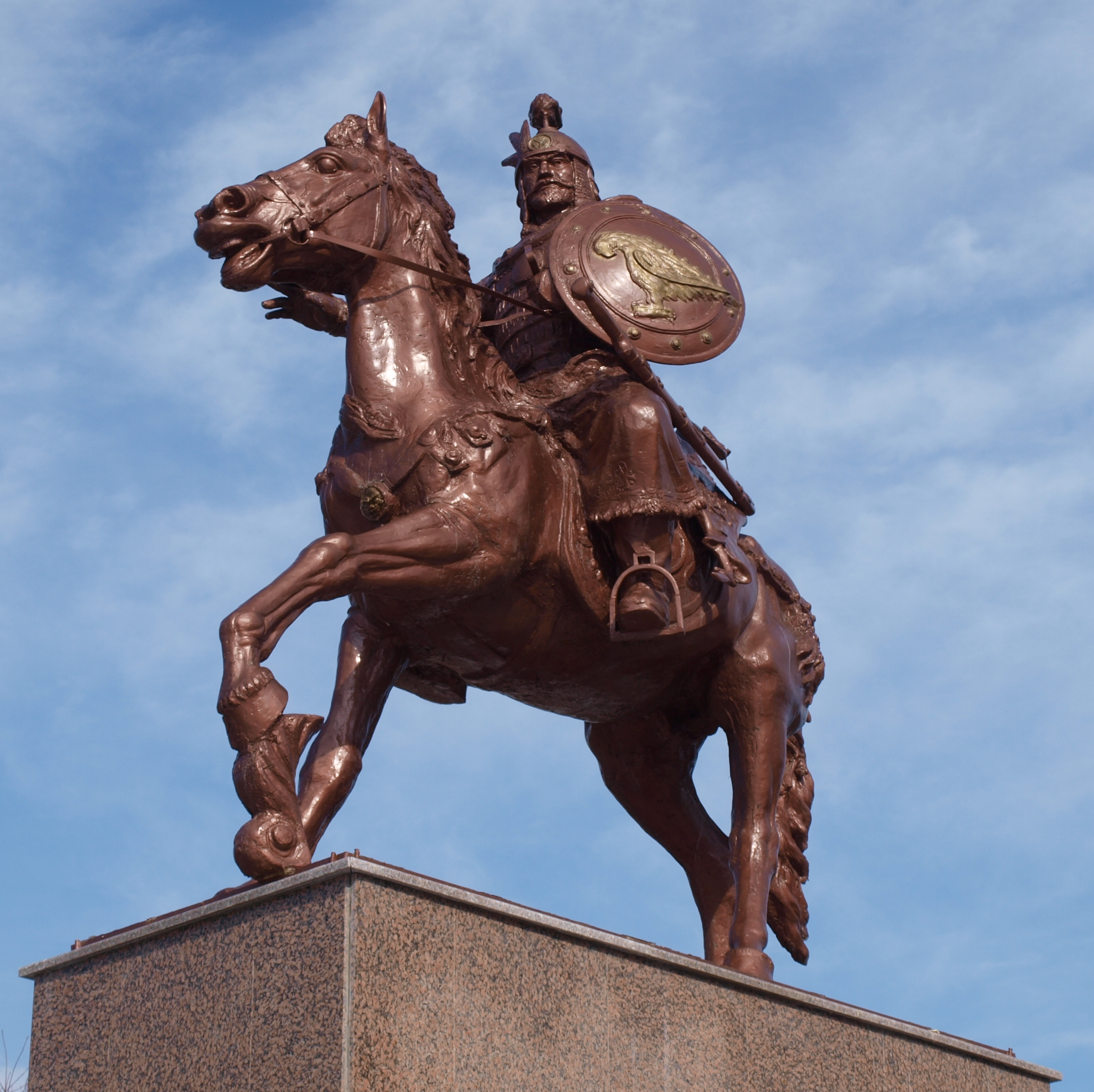 Паметника на кан Аспарух в Стрелча.